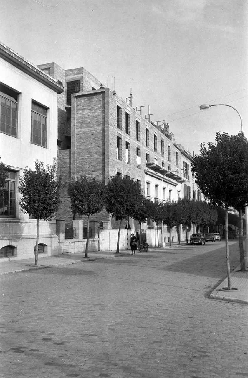 Clínica Doctor Coll. Actual Clínica Girona.